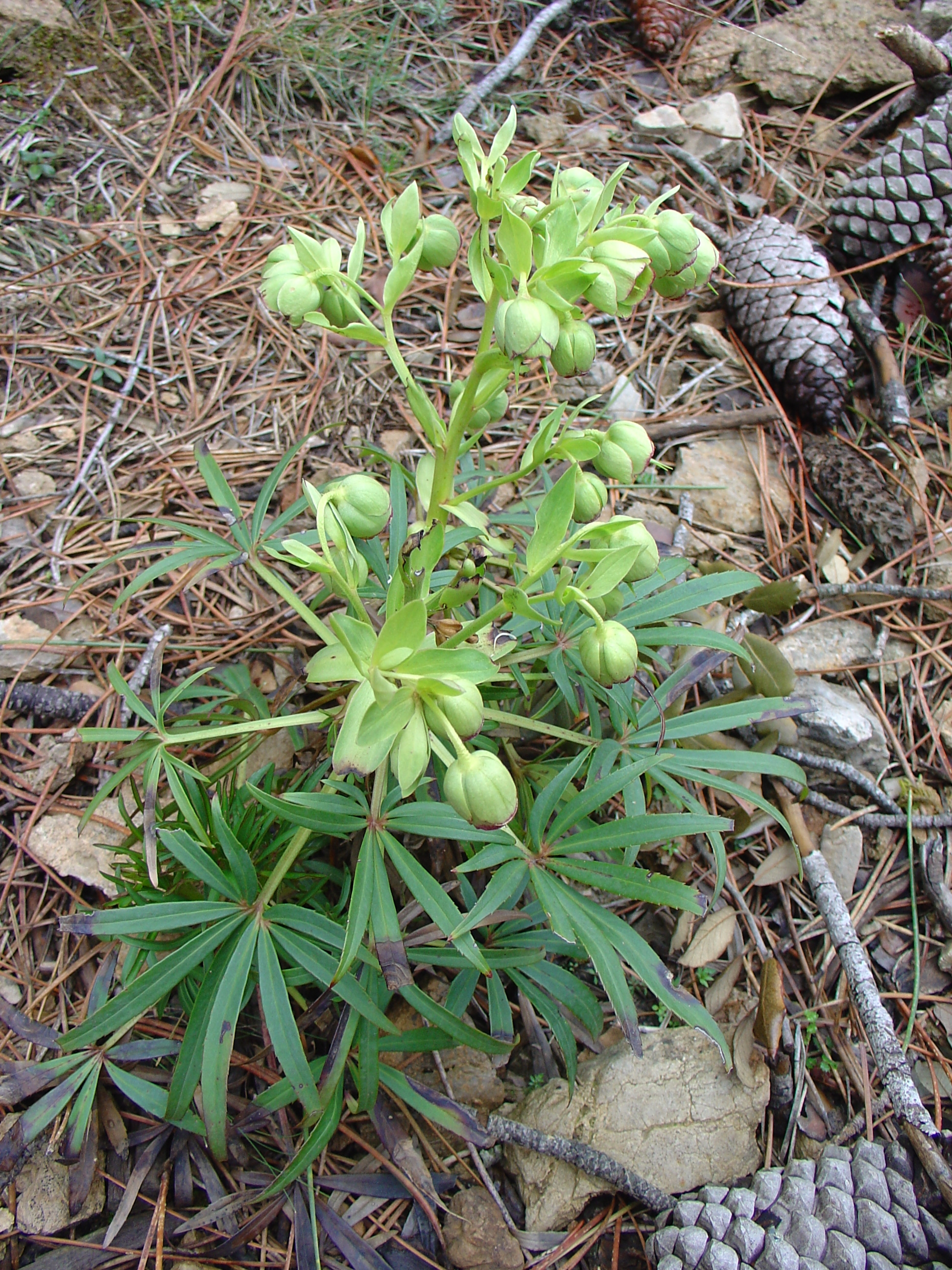 Helleborus foetidus from Sª Espuña, Murcia, Spain